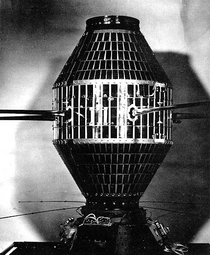 Explorer-20 (IE-A) satellite